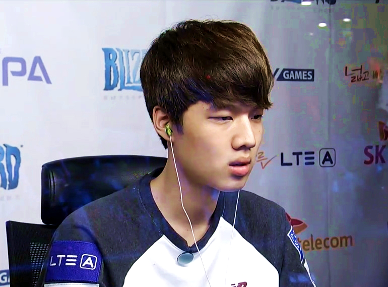 프로게이머